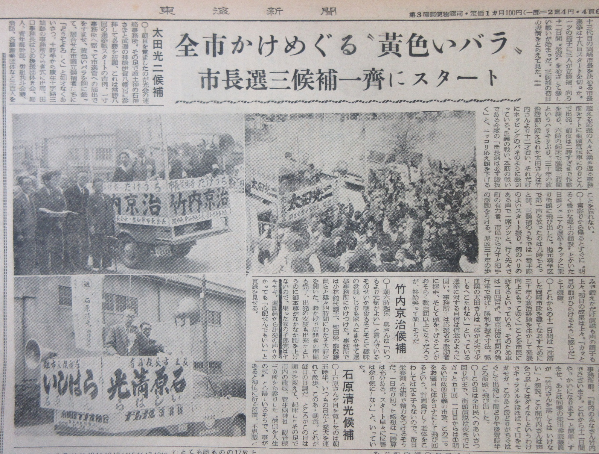 『東海新聞』1959年4月19日、2面。岡崎市長選挙の公示を報じる記事。